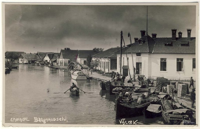 Місто Вилкове: Білгородський канал